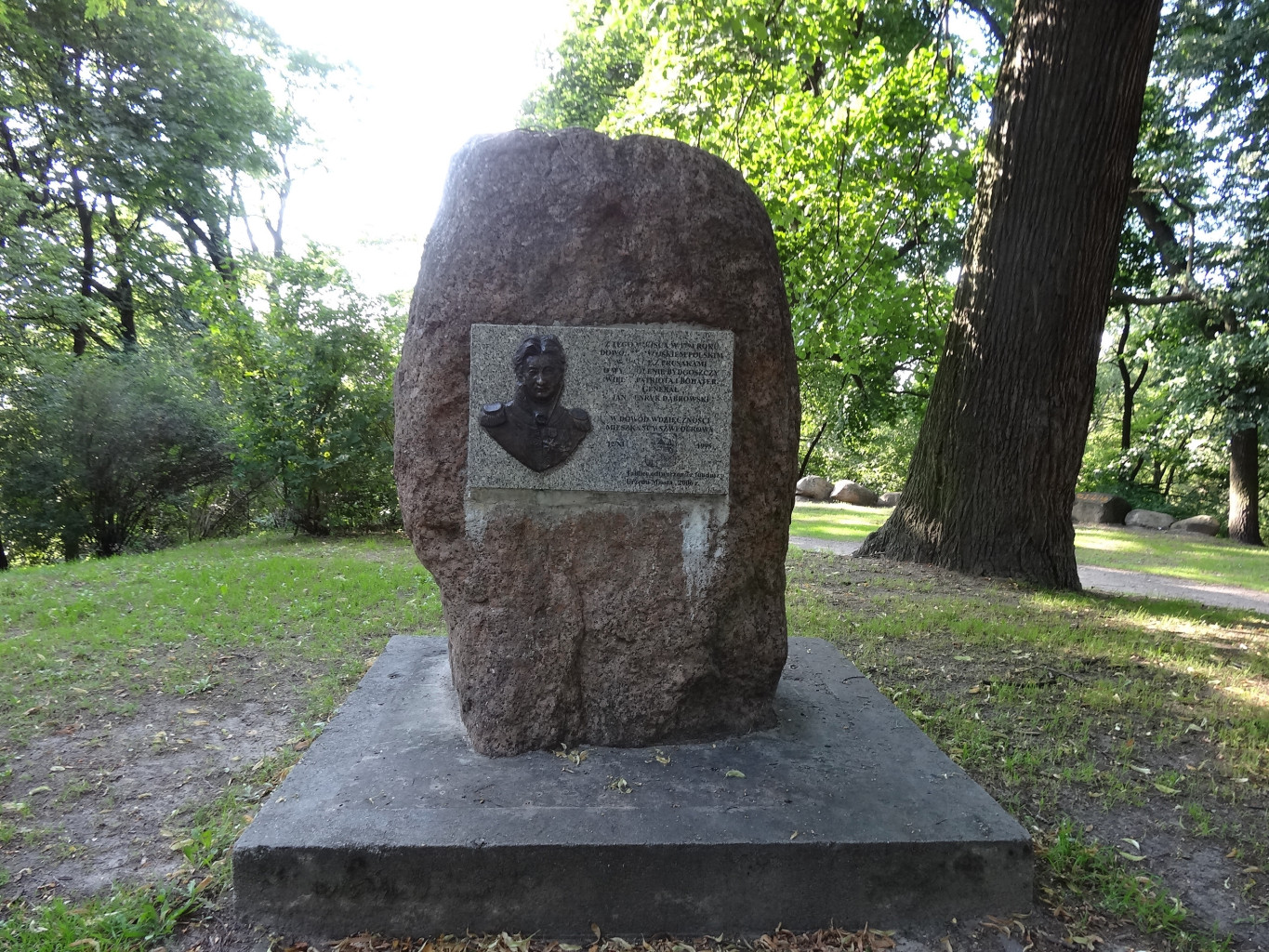 Kamień pamiątkowy ku czci generała Henryka Dąbrowskiego, który 2 października 1794 r. odbił Bydgoszcz z rąk pruskich podczas insurekcji kosciuszkowskiej (autor Krystyna Panasik, 1999)